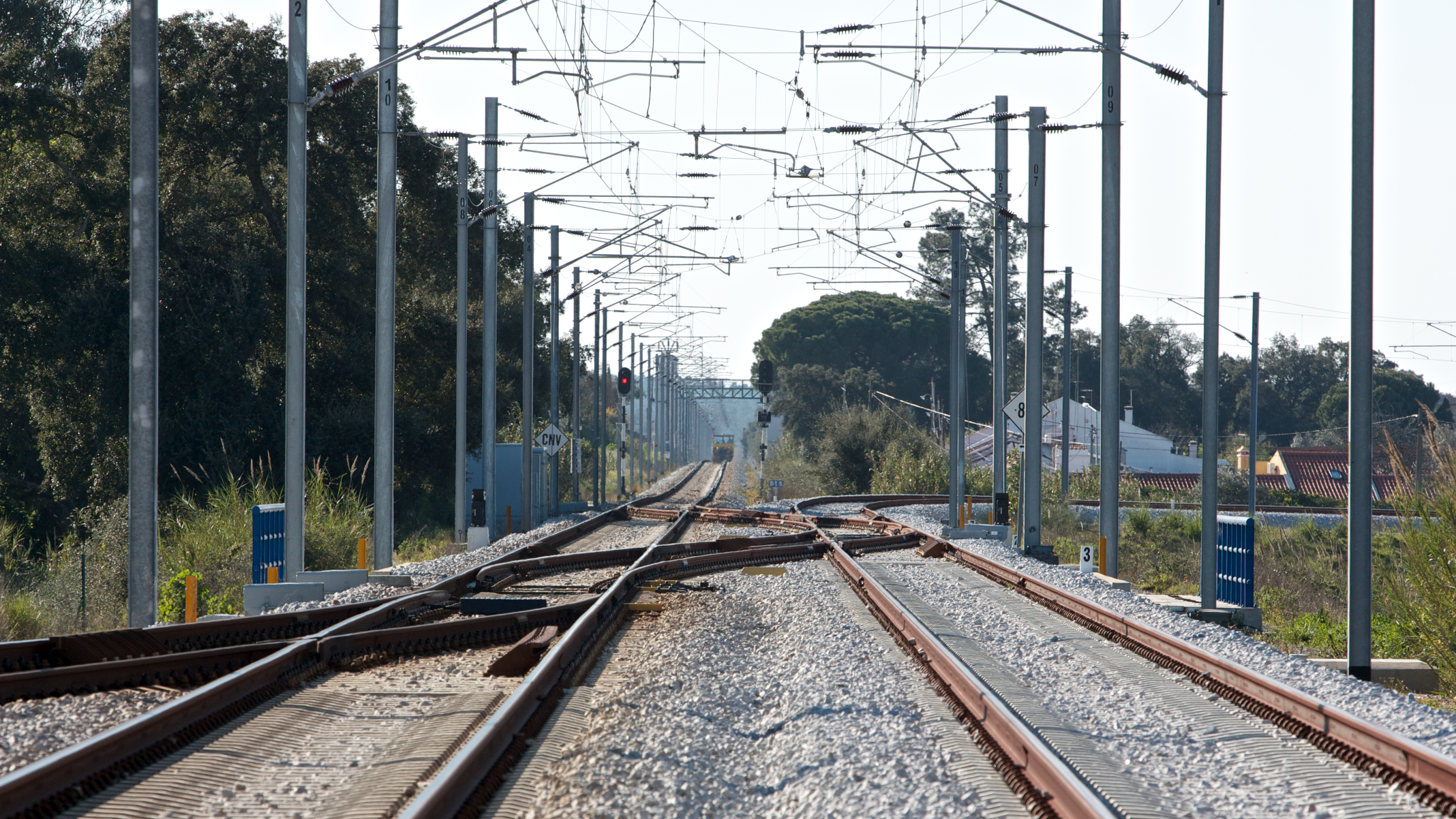 à esquerda, a Linha do Alentejo. à direita, a Linha de Vendas Novas. Via férrea: Linha do Alentejo [PK 56] • Linha de Vendas Novas [PK 68] Local: Estação de Vendas Novas Data e hora: 11 de Março de 2014 [16h08] Sentido: Barreiro e Setil